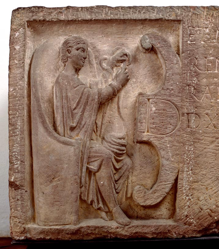 Une des Parques décorant le sarcophage de Florentina (3e siècle après J.-C.)